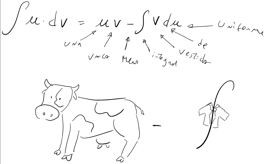 Memotecnia para integral por partes